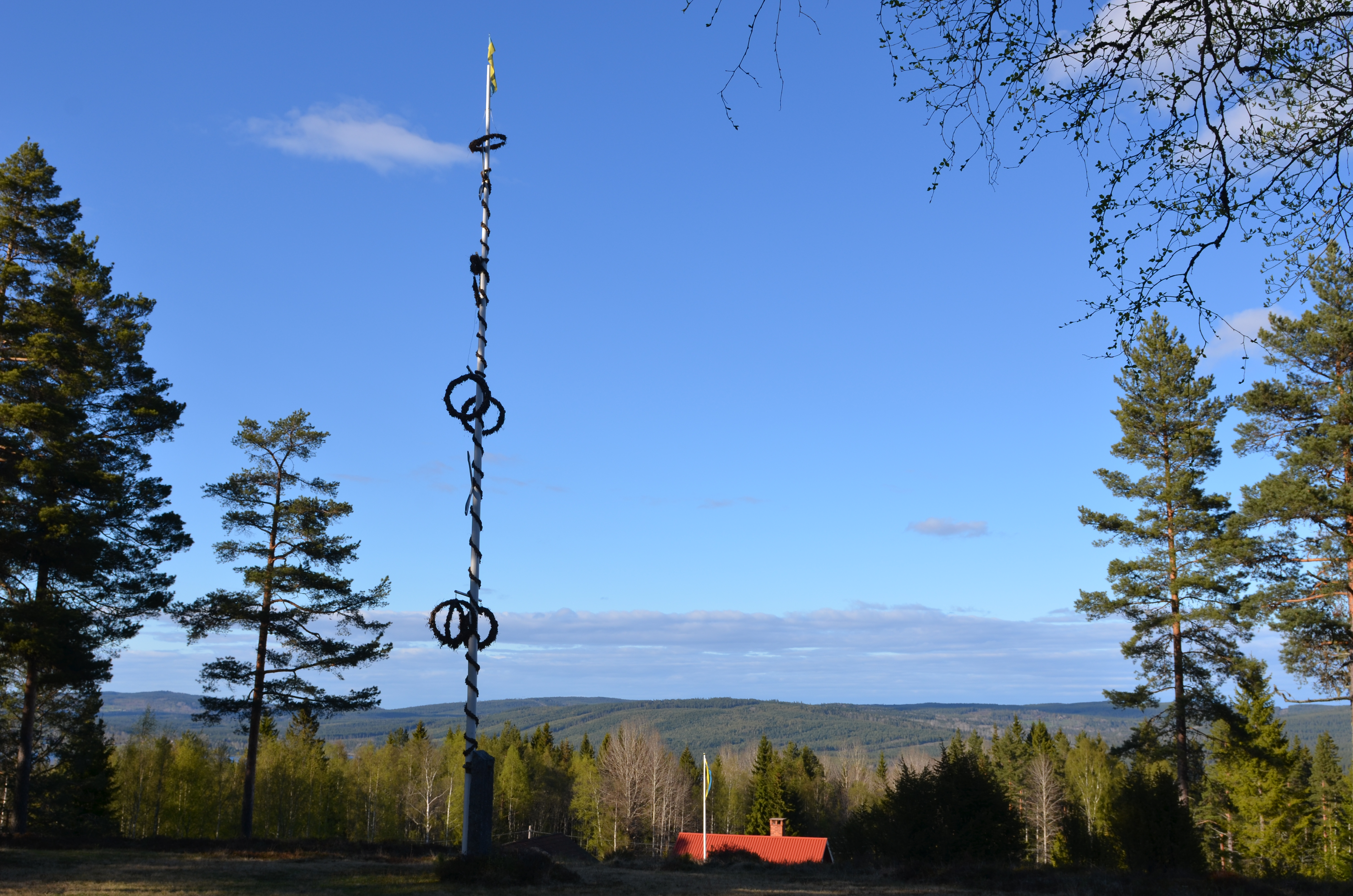 Majstången på Knippboberget i maj 2015.